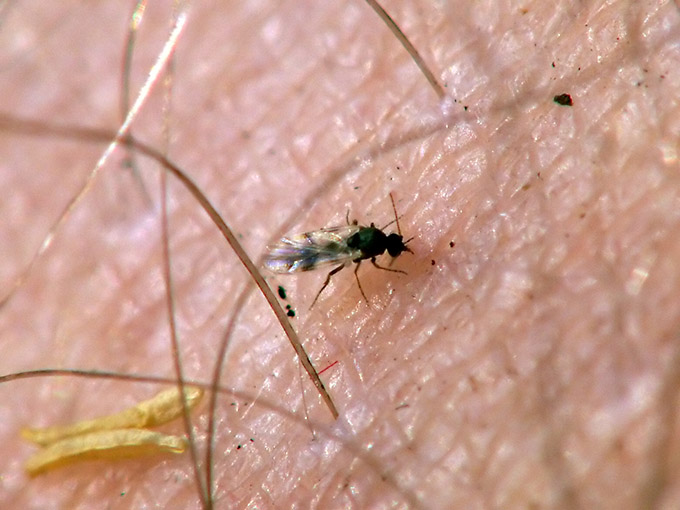 Meszka